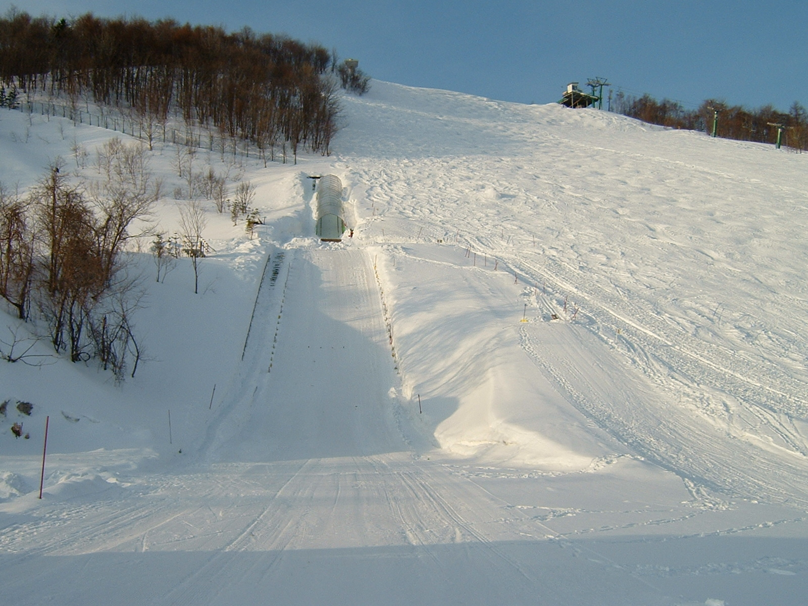 札幌・手稲山シャンツェ Saporo Teineyama-Schanze スキージャンプ競技場